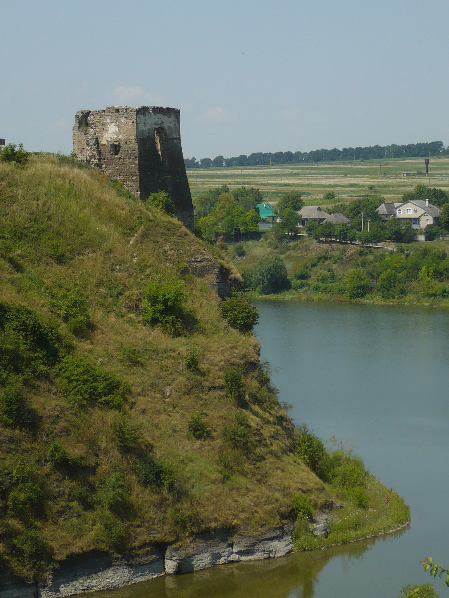 Zamek w Żwańcu